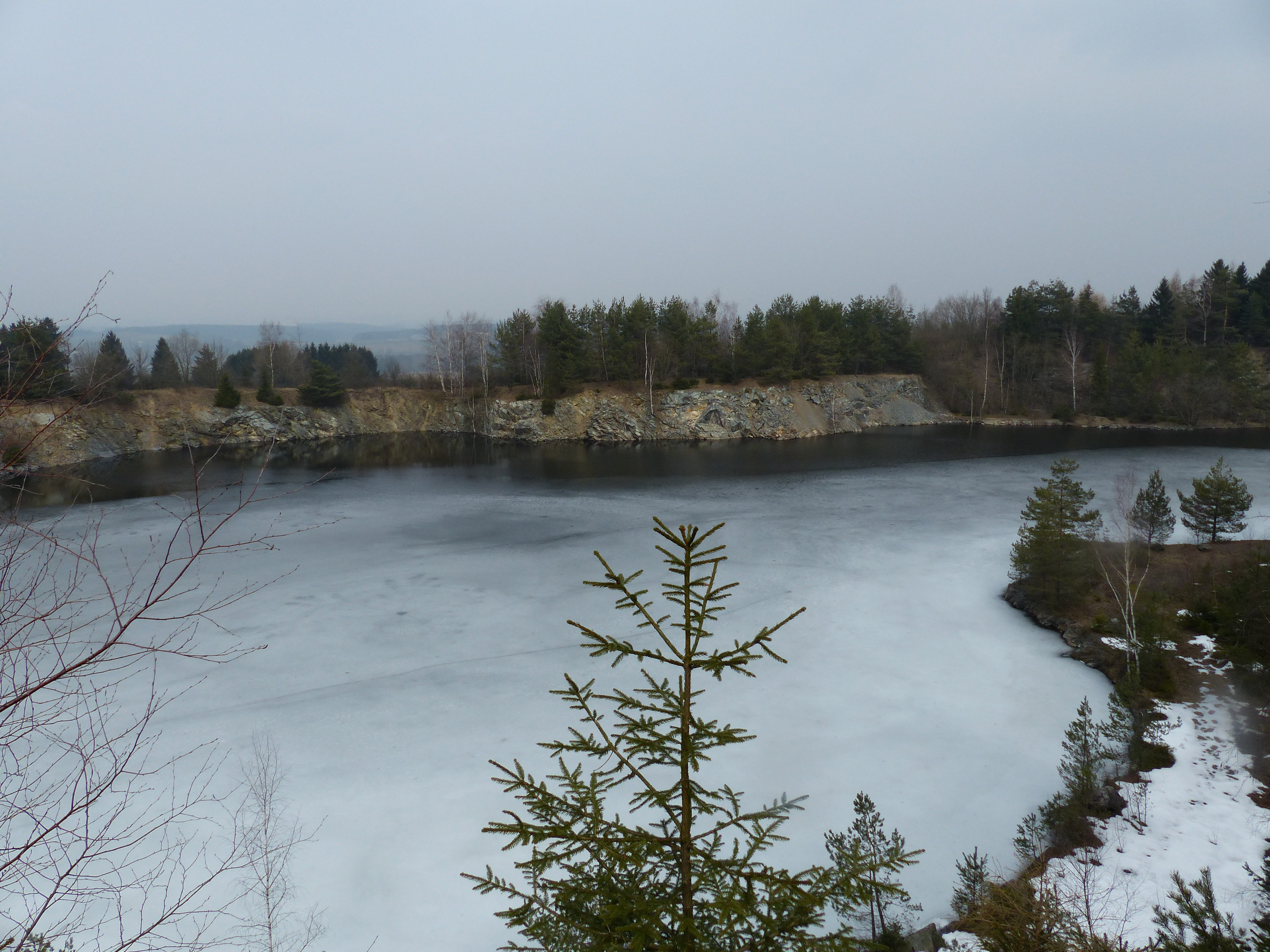 Haidberg bei Zell im Fichtelgebirge, Geotop und Berg